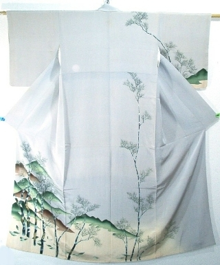 Houmongi, homongi